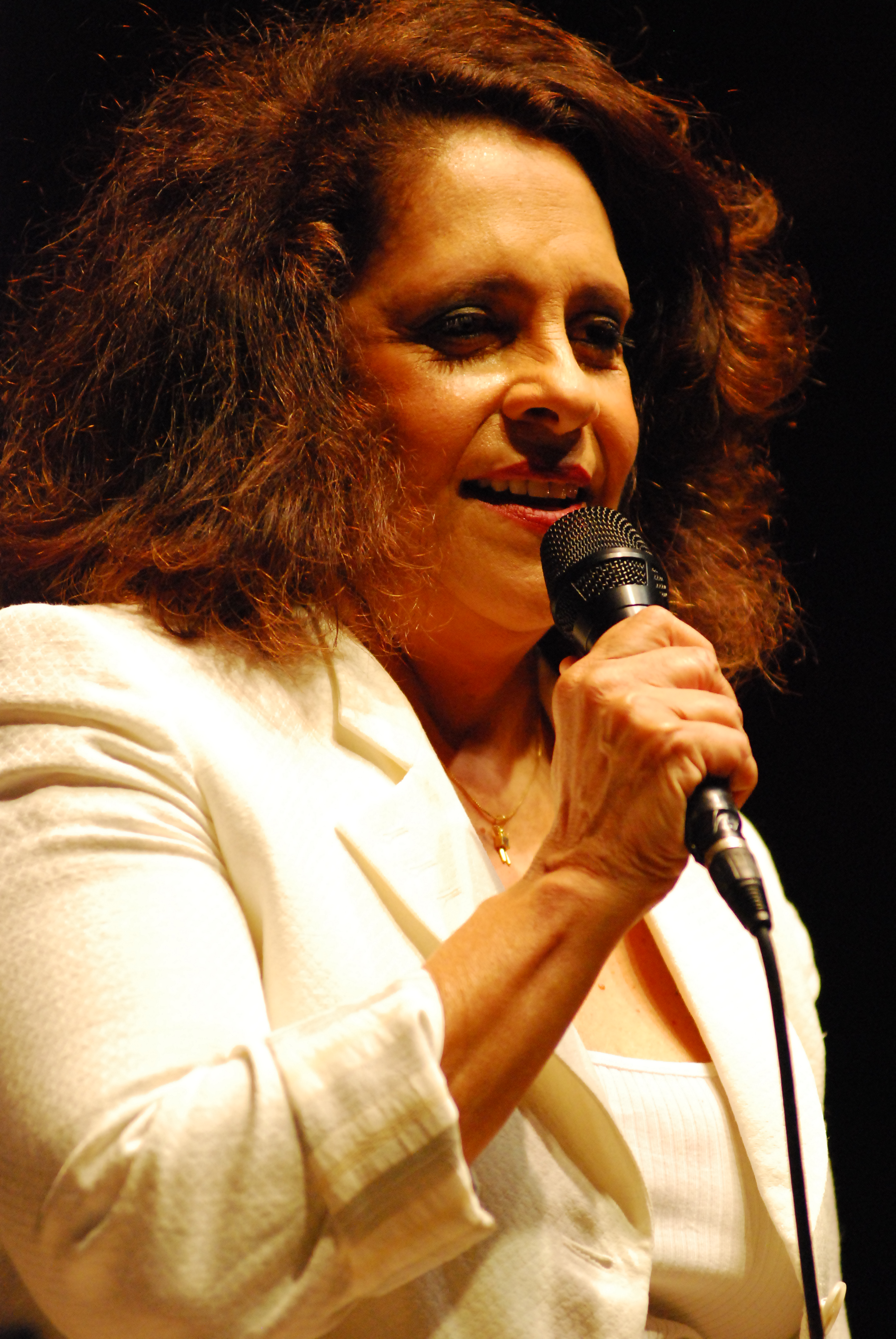 Gal Costa. Foto: Silvio Tanaka